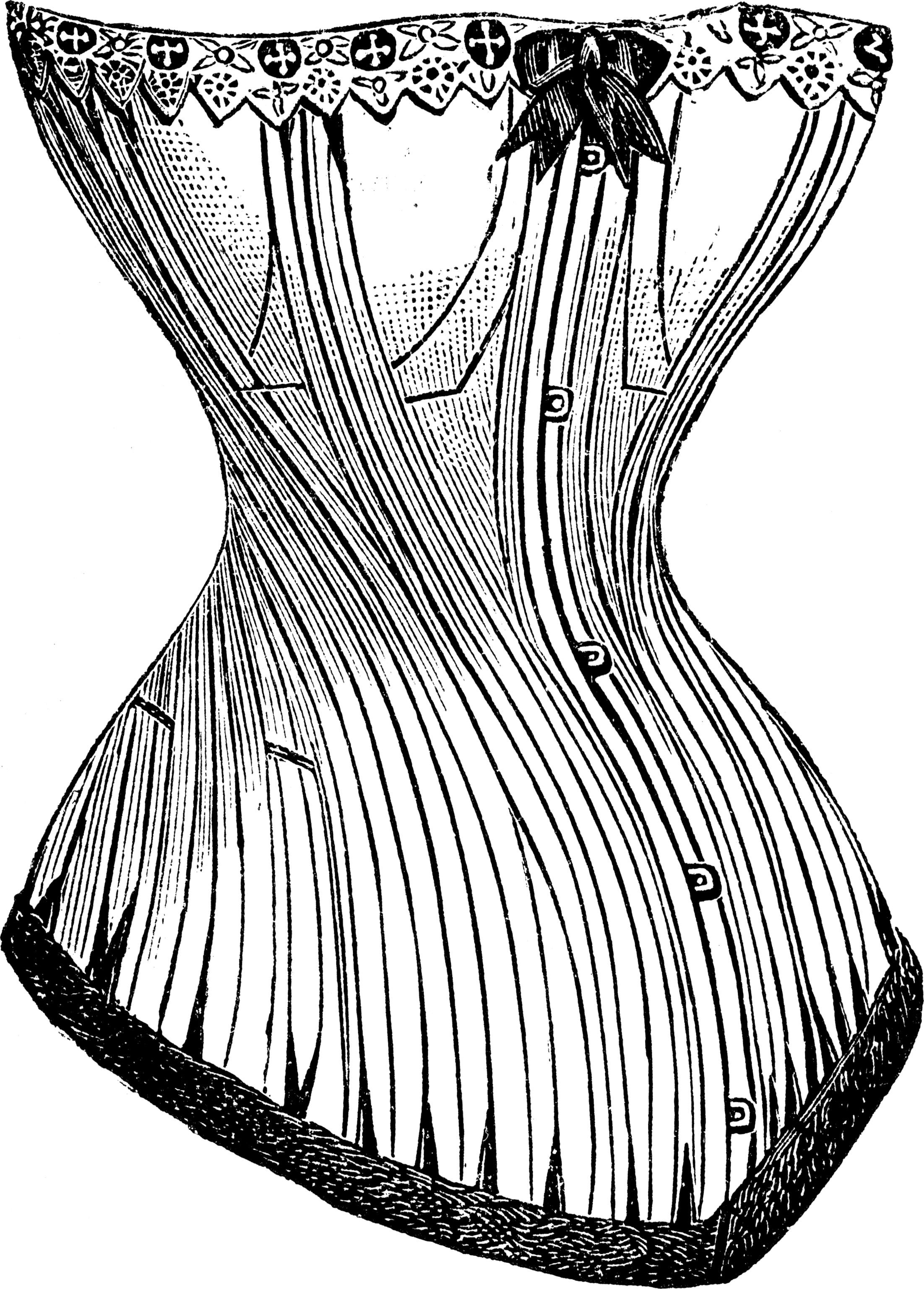 CORSETS satin fil écru, éventaillés couleurs, baleinage extra-fort, gorge baleinée en travers Longueur 0m38 24.50 Les mêmes coutil blanc extra, garnis dentelle 30. »